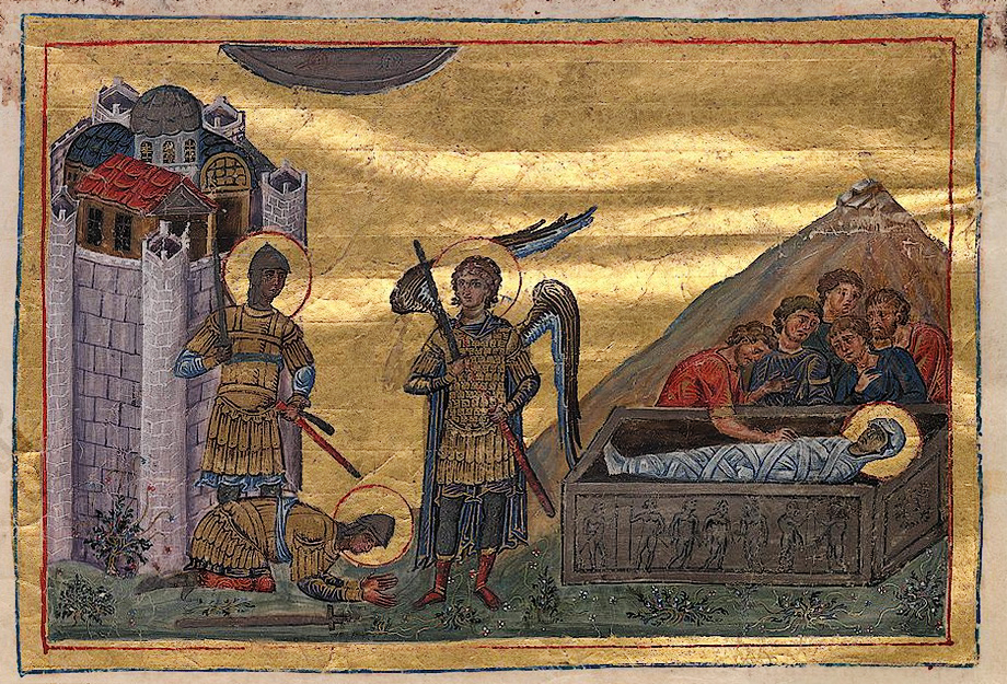 Szene der Begegnung Josuas mit dem "Anführer des Heeres des Herrn" auch in einer Miniatur des sogenannten "Menologion" des Kaisers Basileios II.